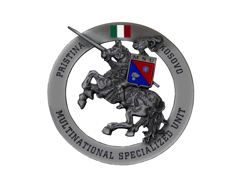 Logo della Multinational Specialized Unit (Carabinieri) - Raffigura San Giorgio con lo stemam di MSU e la bandiera italiana (Logo a partire dal 2013, precedentemente era simile ma con le bandiere degli altri stati facenti parte l'MSU.